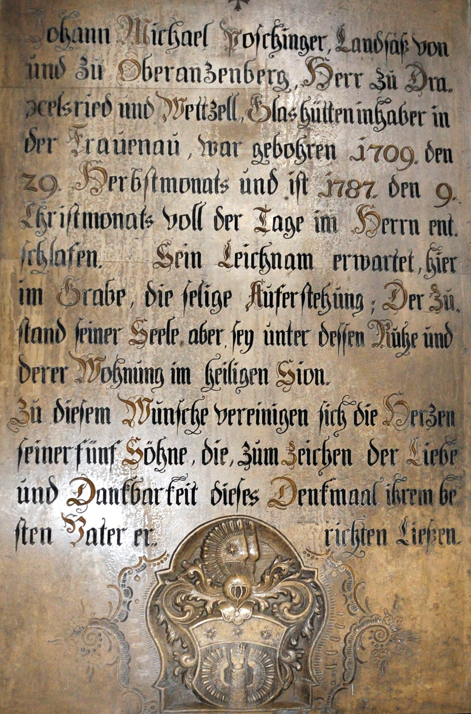 Pfarrkirche Mariä Himmelfahrt in Frauenau (Deutschland). Grabstein Michael Poschinger (1709-1787) im Innenraum der Kirche.